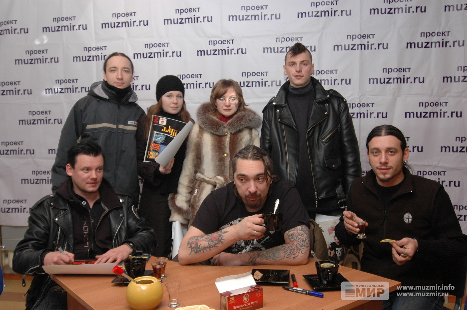 Сыктывкар, магазин «Музыкальный мир», 20 ноября 2007